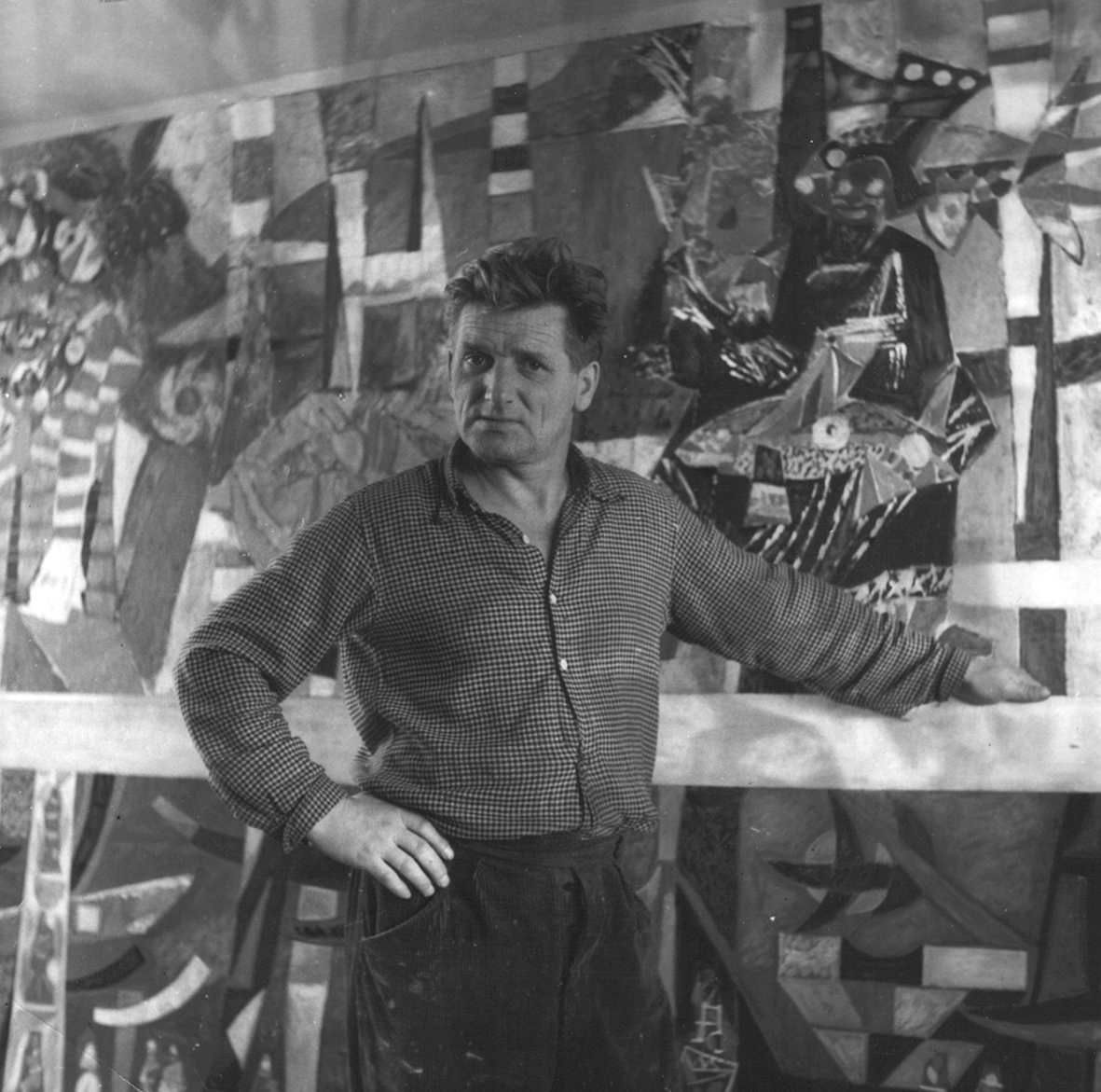 Kazimierz Ostrowski ok.1965 roku